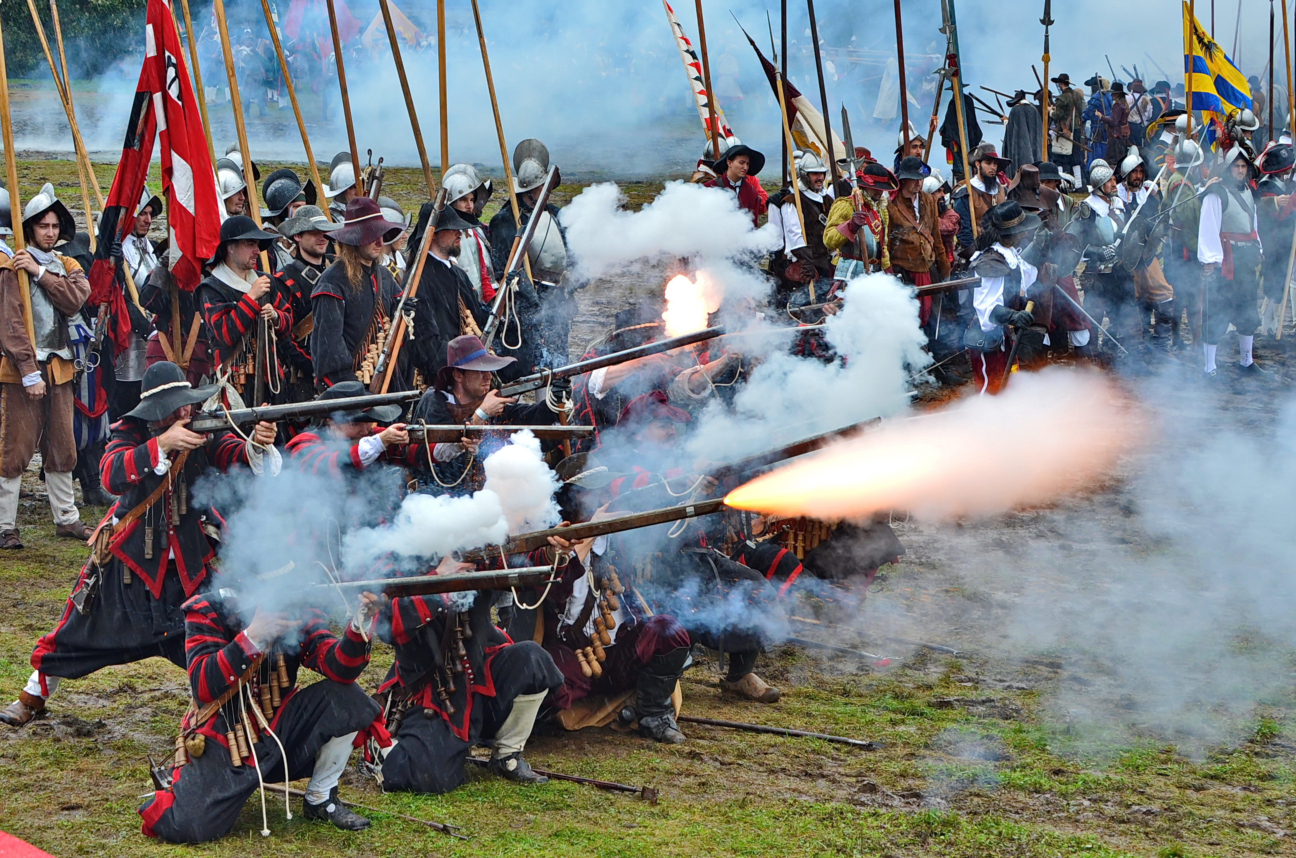 263 - Bila Hora 2014